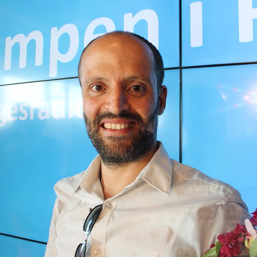 Idriz Zogaj i P1-studio